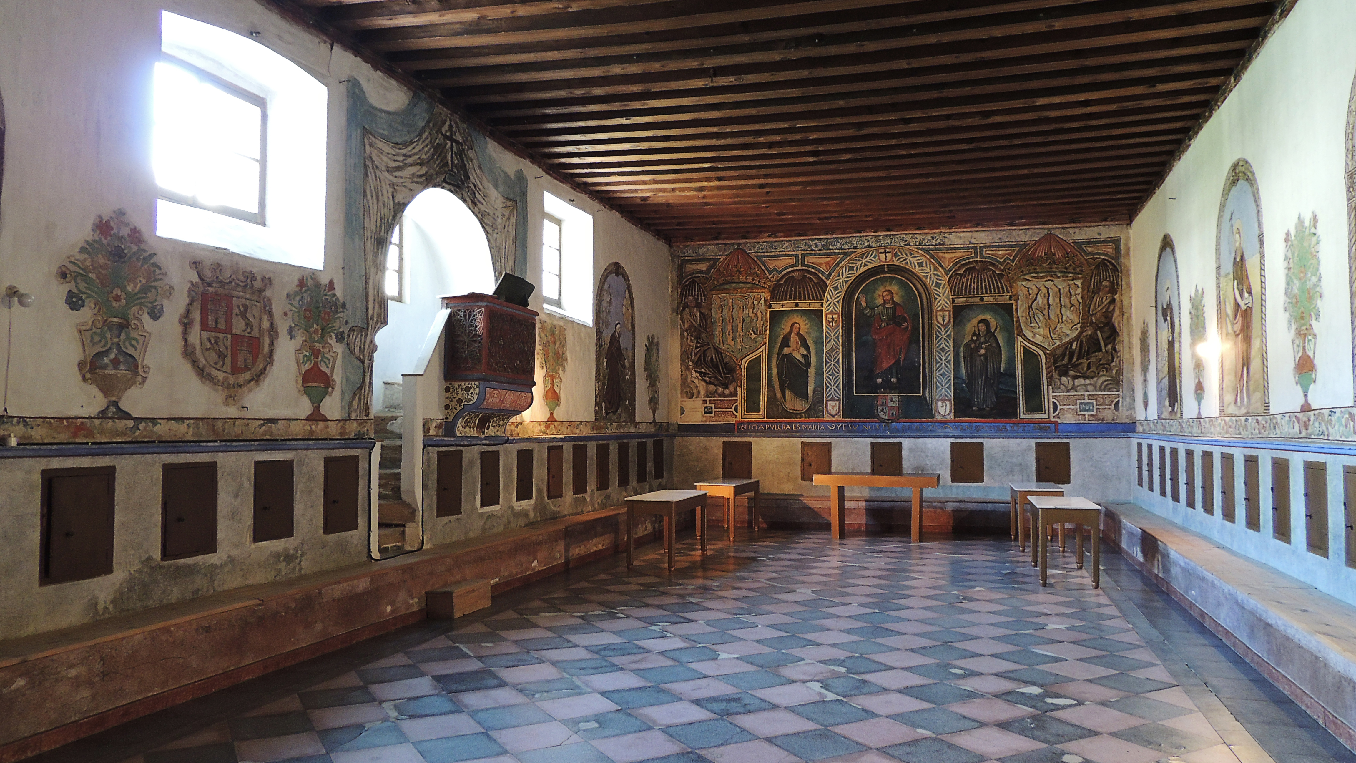 Refectorio de San Antonio el Real